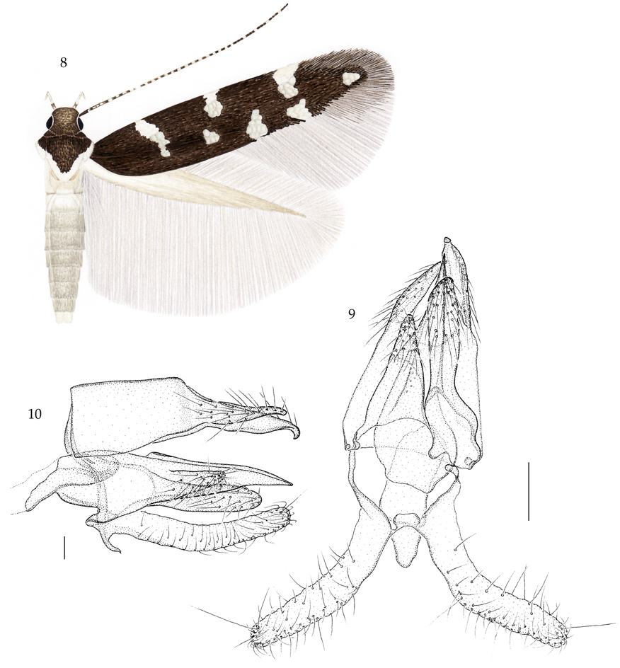 8, Vulcaniella kabulensis spec. nov. 9, Vulcaniella kabulensis spec. nov., male genitalia, ventrally. 10, Vulcaniella kabulensis spec. nov., male genitalia, laterally. Scales 0.1 mm.